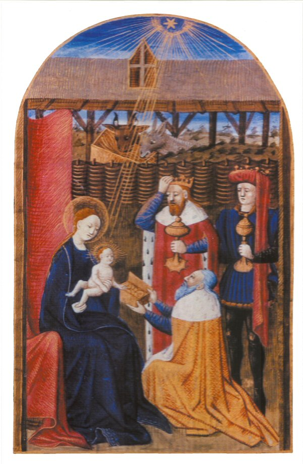 sujet: Les rois mages date: 1440 licence